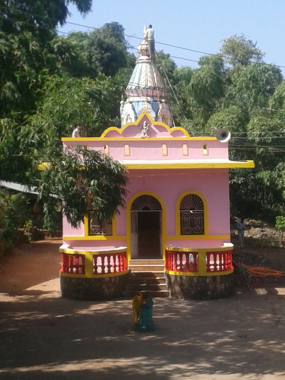 विठ्ठल रुक्मिणी